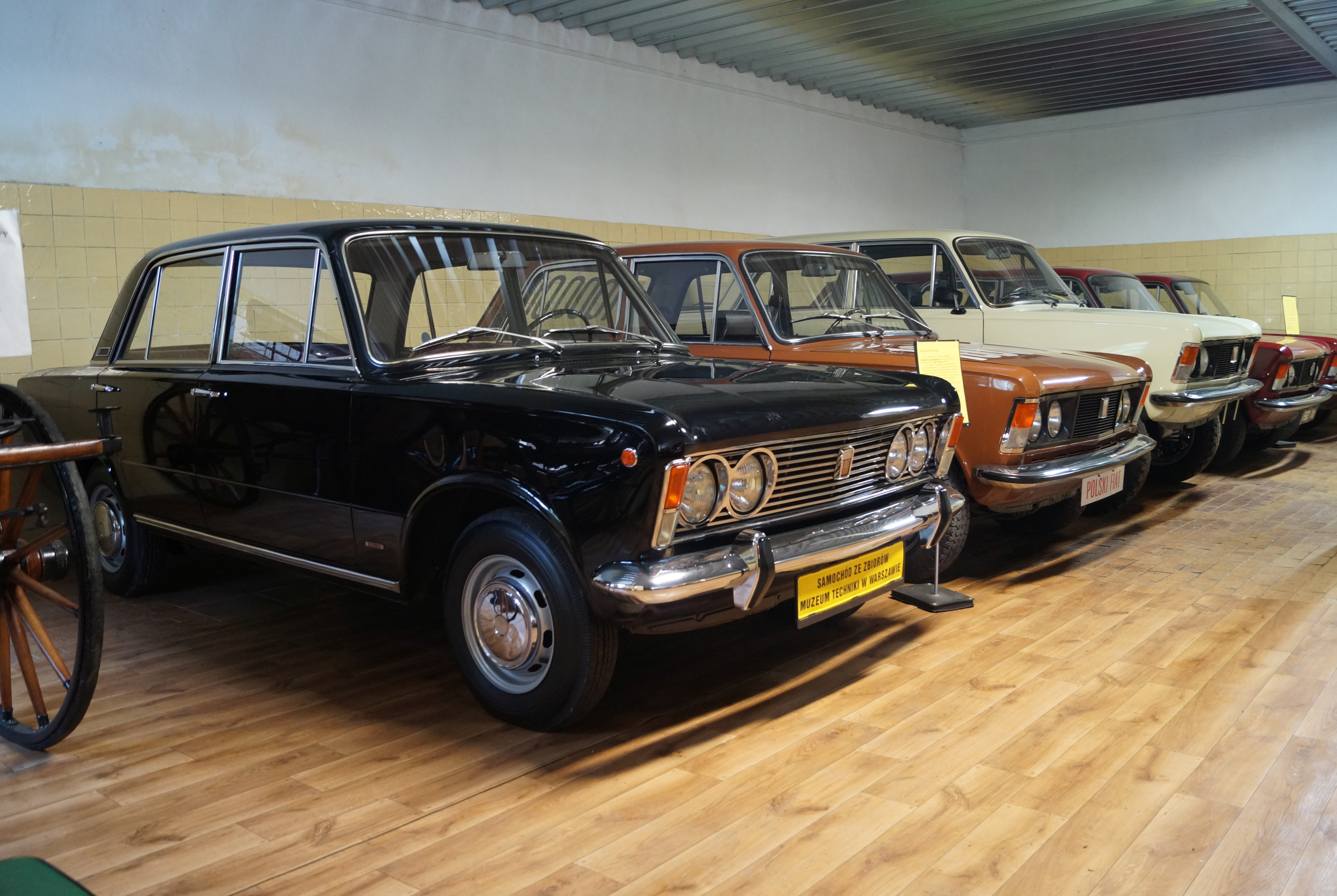 The making of this document was supported by Wikimedia Polska Association, within Wikigrant no. WG 2016-18. English | polski | +/− Polskie Fiaty 125p w Muzeum w Chlewiskach